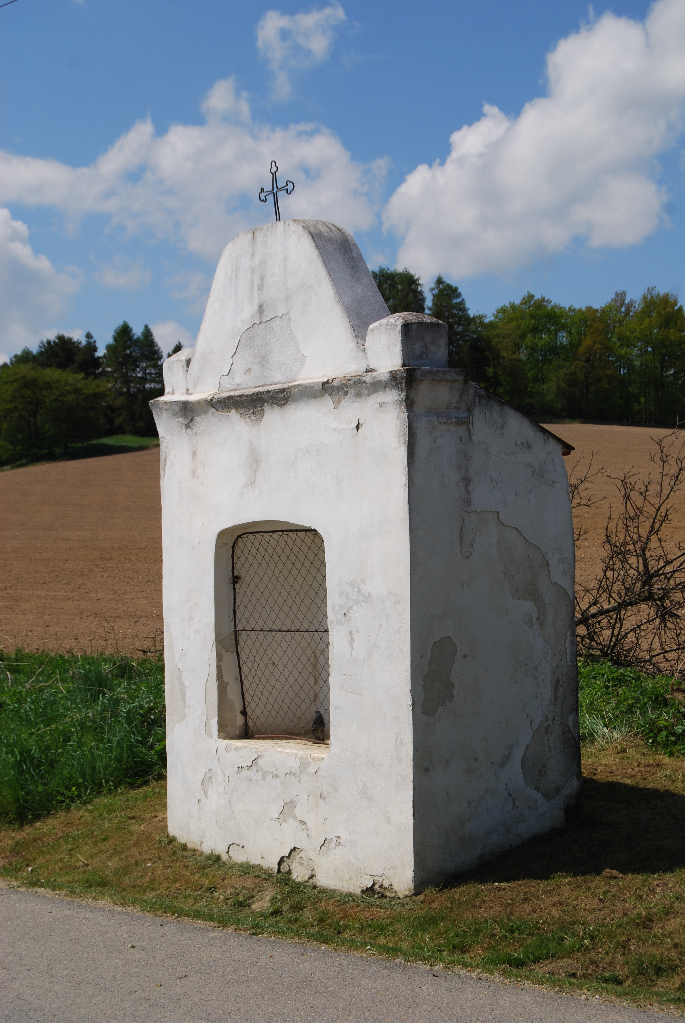 Výklenková kaple u komunikace z obce ve směru na Žabrakov. Obec Lipovice se nachází v okrese Prachatice, kraj Jihočeský. Česká republika.